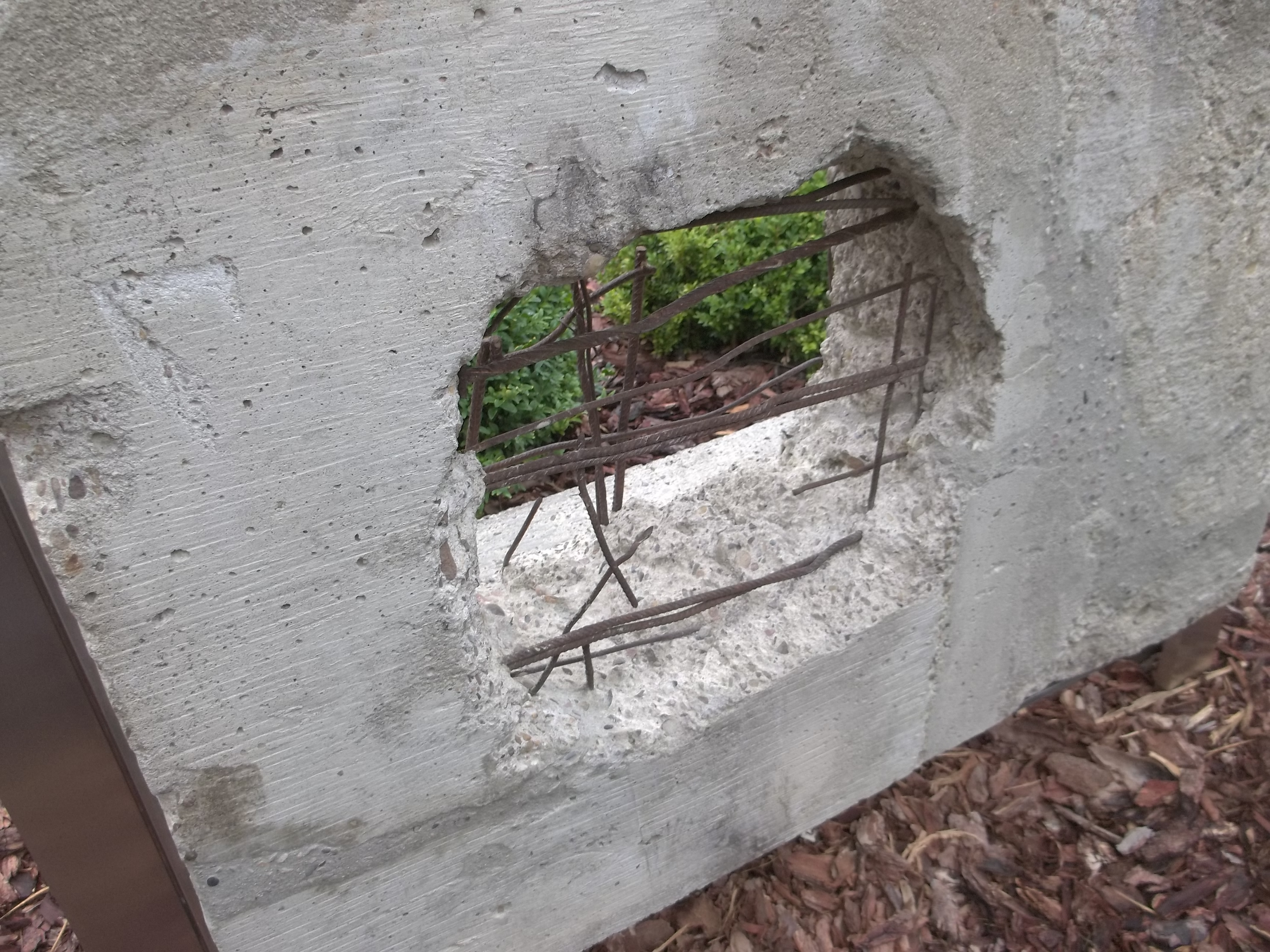 Celler Loch (detail)